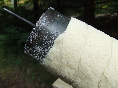 kürtős kalács